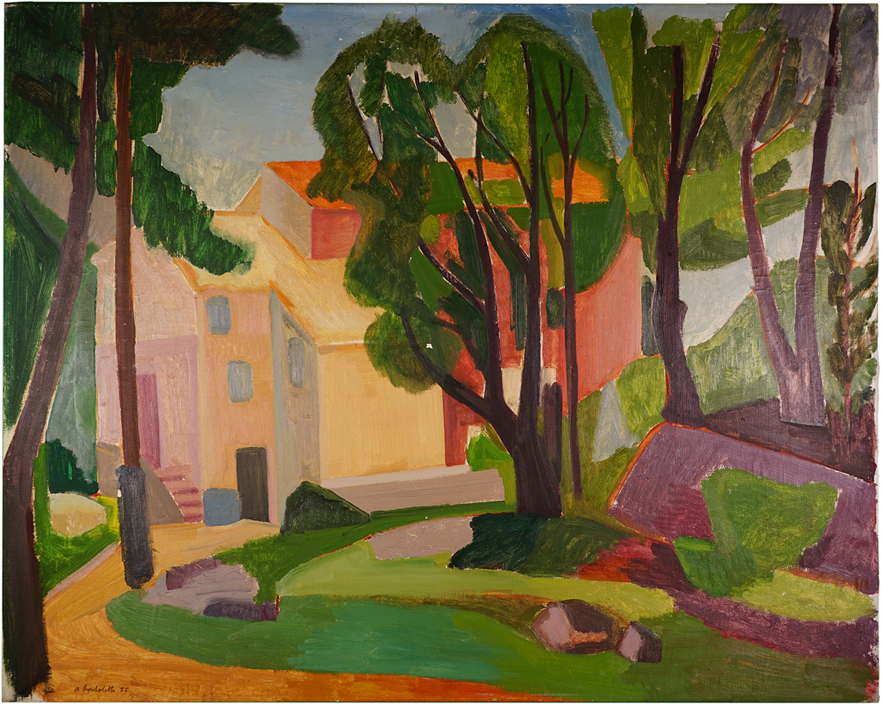 Gemälde Alfred Bartolettis: Nr. 169, Landschaft (Paysage), 110×90 cm, Öl auf Leinwand, Signatur: a.bartoletti 55